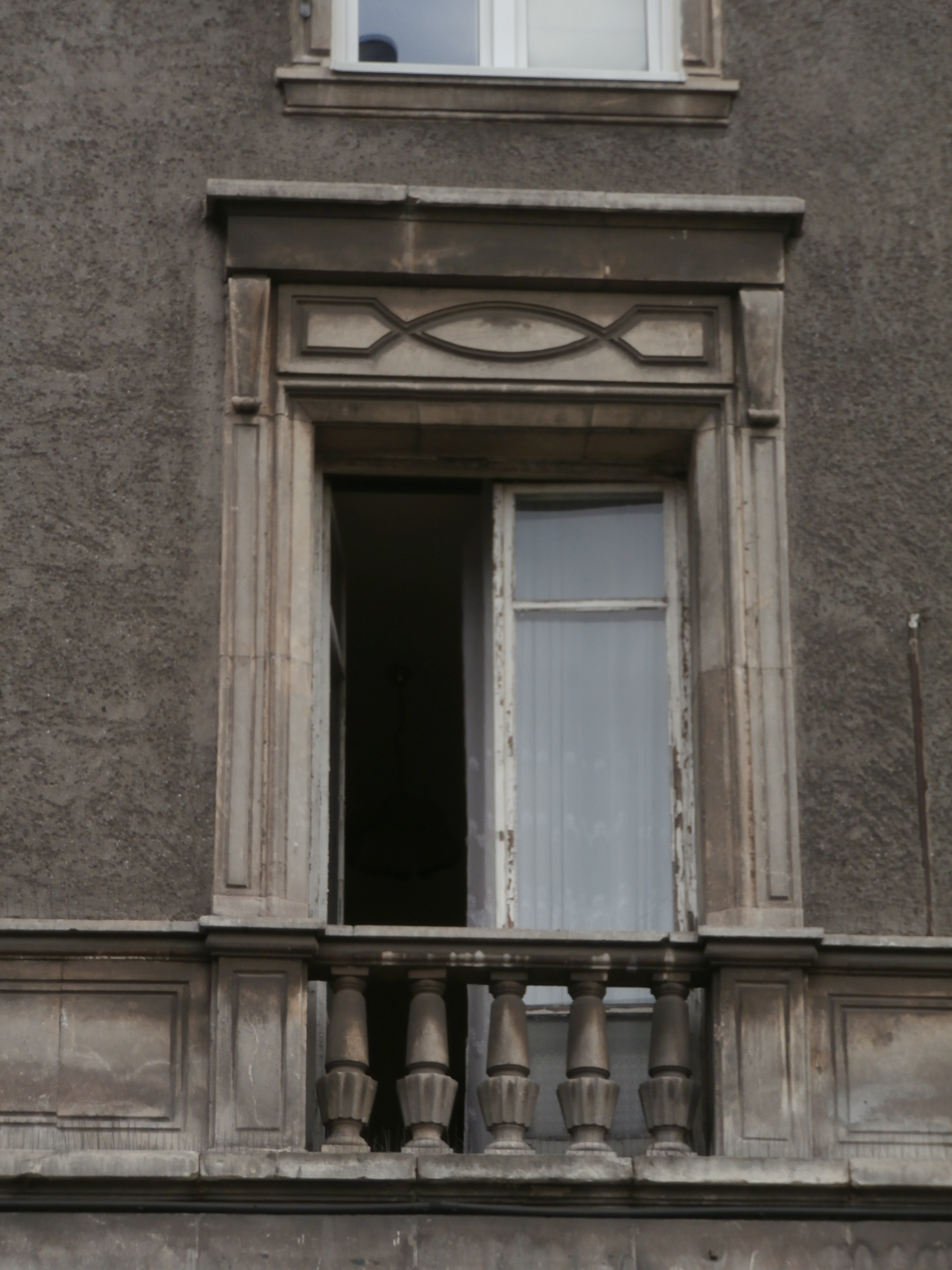 Charakterystyczna ozdoba okien na Placu Centralnym w Krakowie-Nowej Hucie.